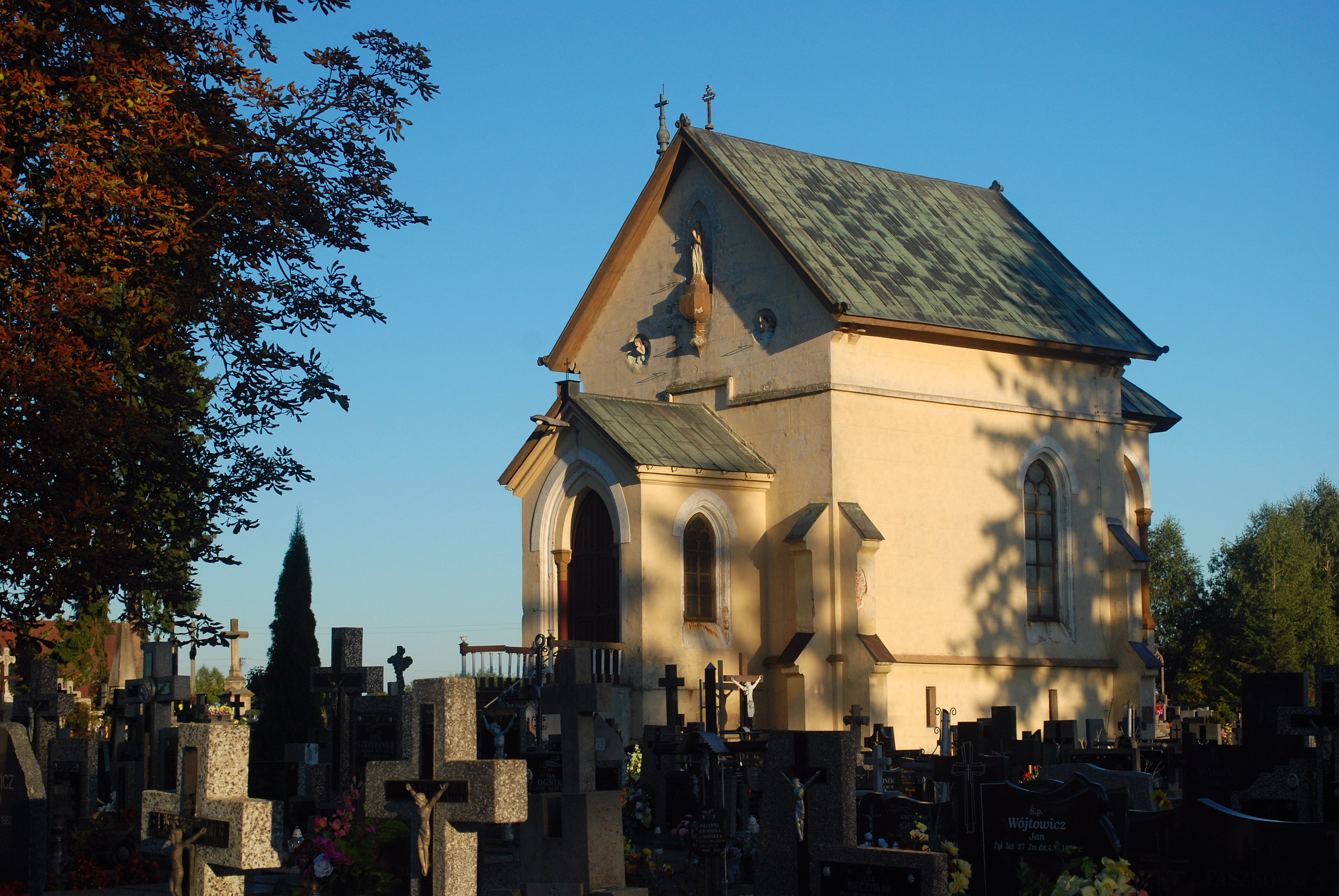 Radzyń Podlaski, kaplica grobowa rodziny Korwin-Szlubowskich, 3 ćw. XIX (na cmentarzu par.)